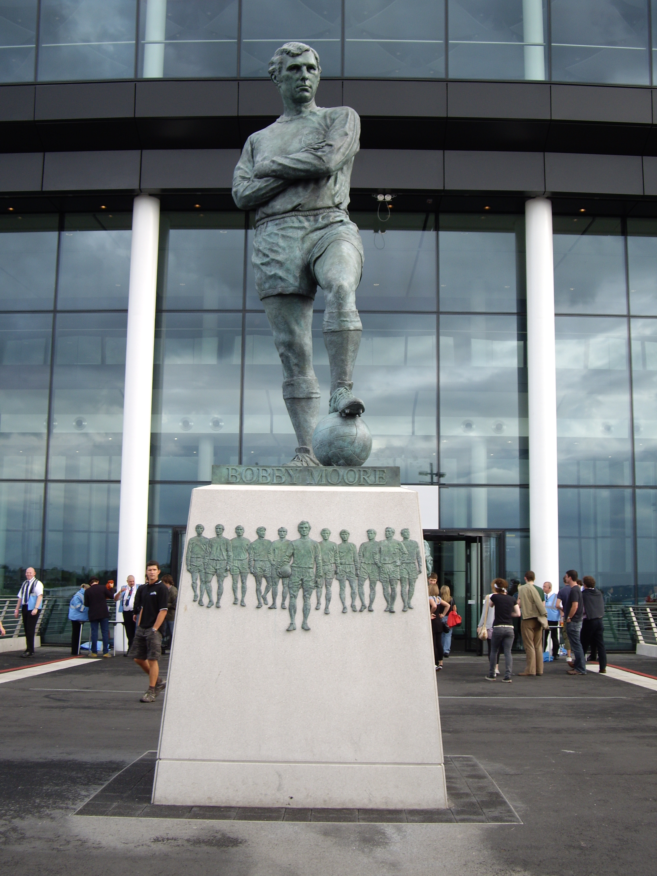 Just some random footballer ;)